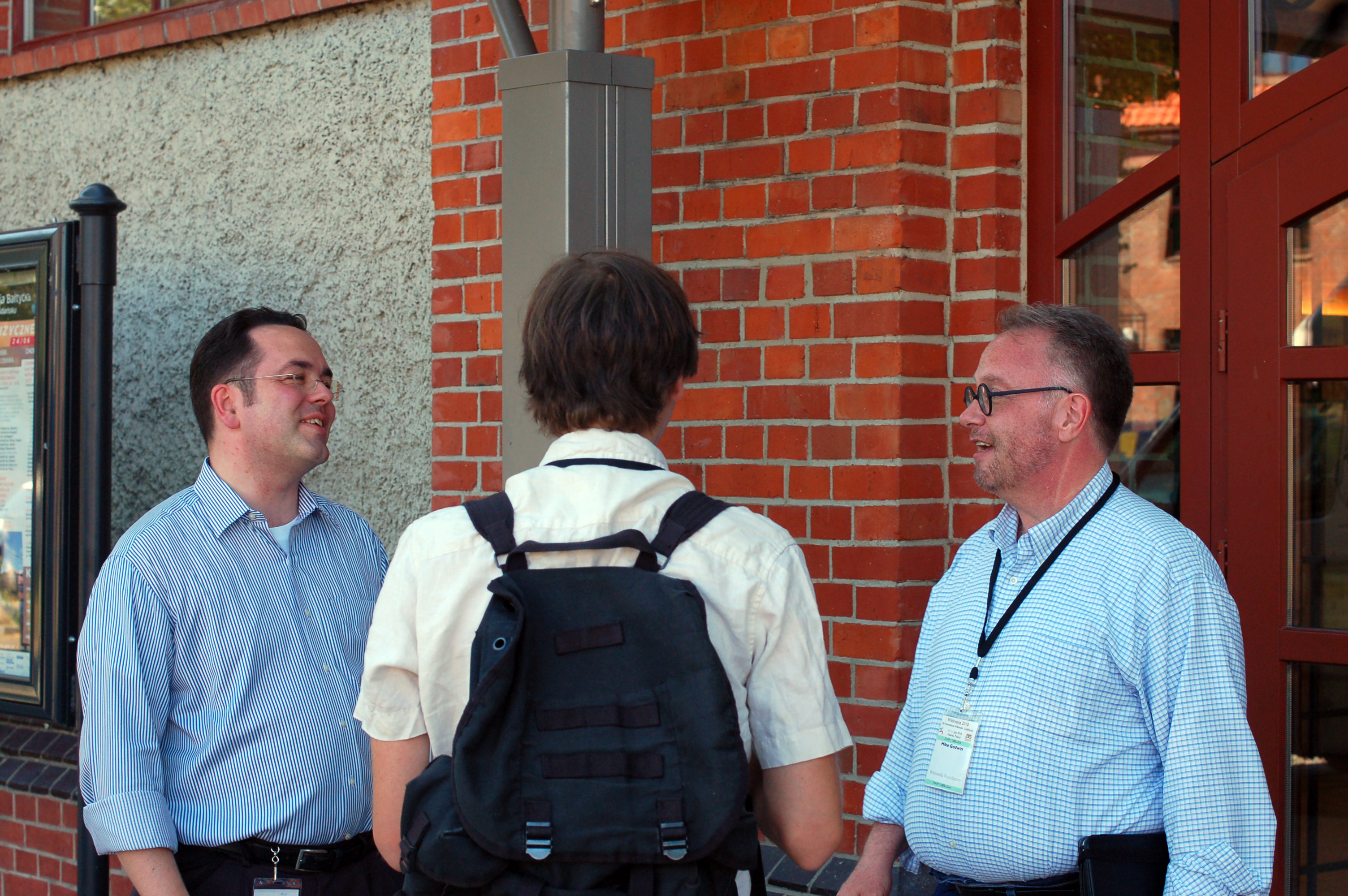 Wikimania Gdansk 2010